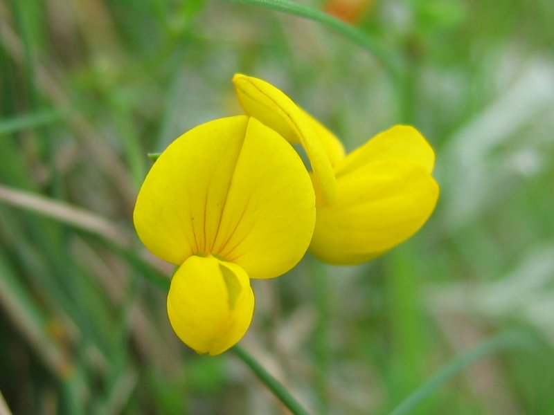 Salz-Hornklee Lotus tenuis, Wismarbucht